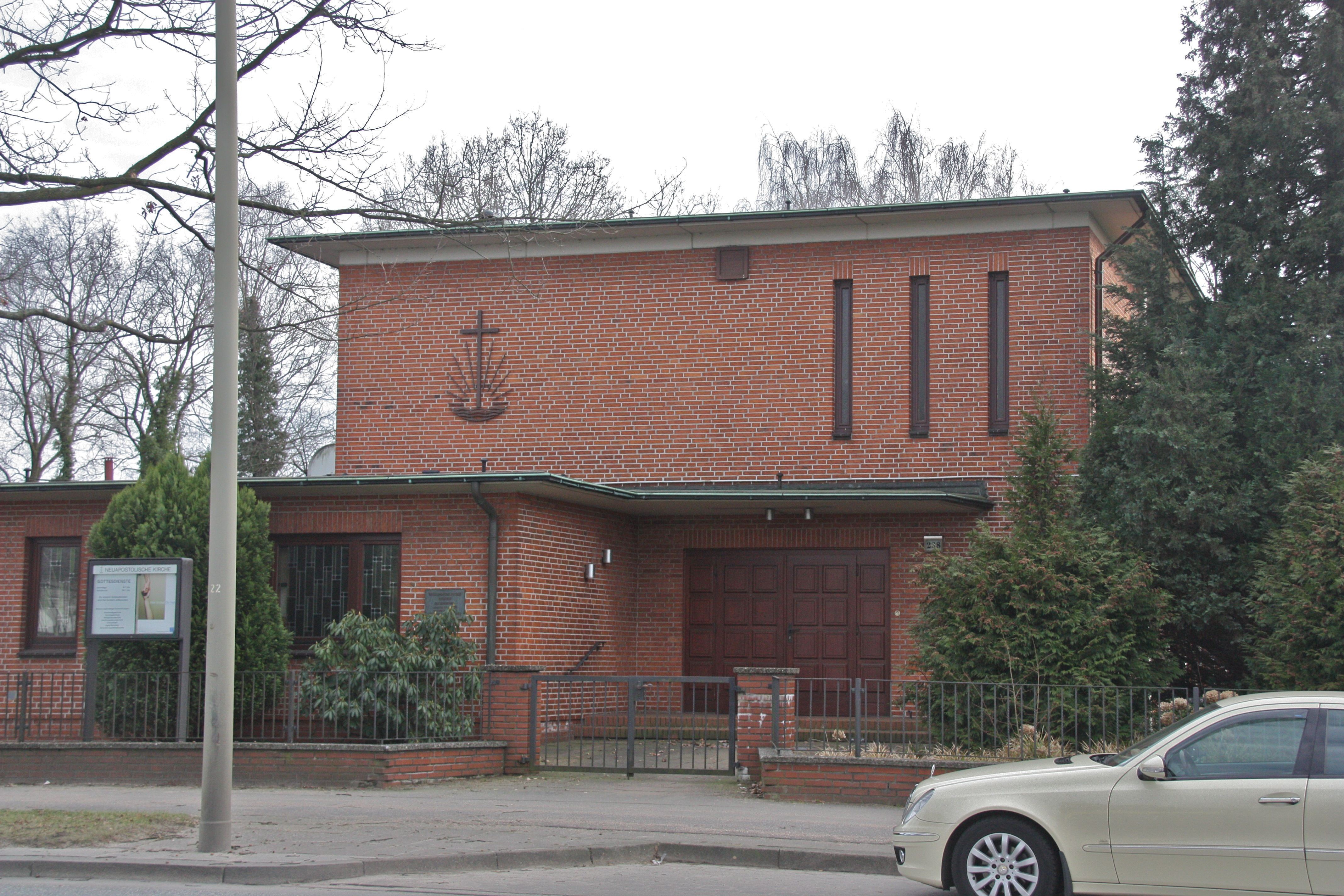 Hamburg, Neuapostolische Kirche Lurup, Rugenbarg